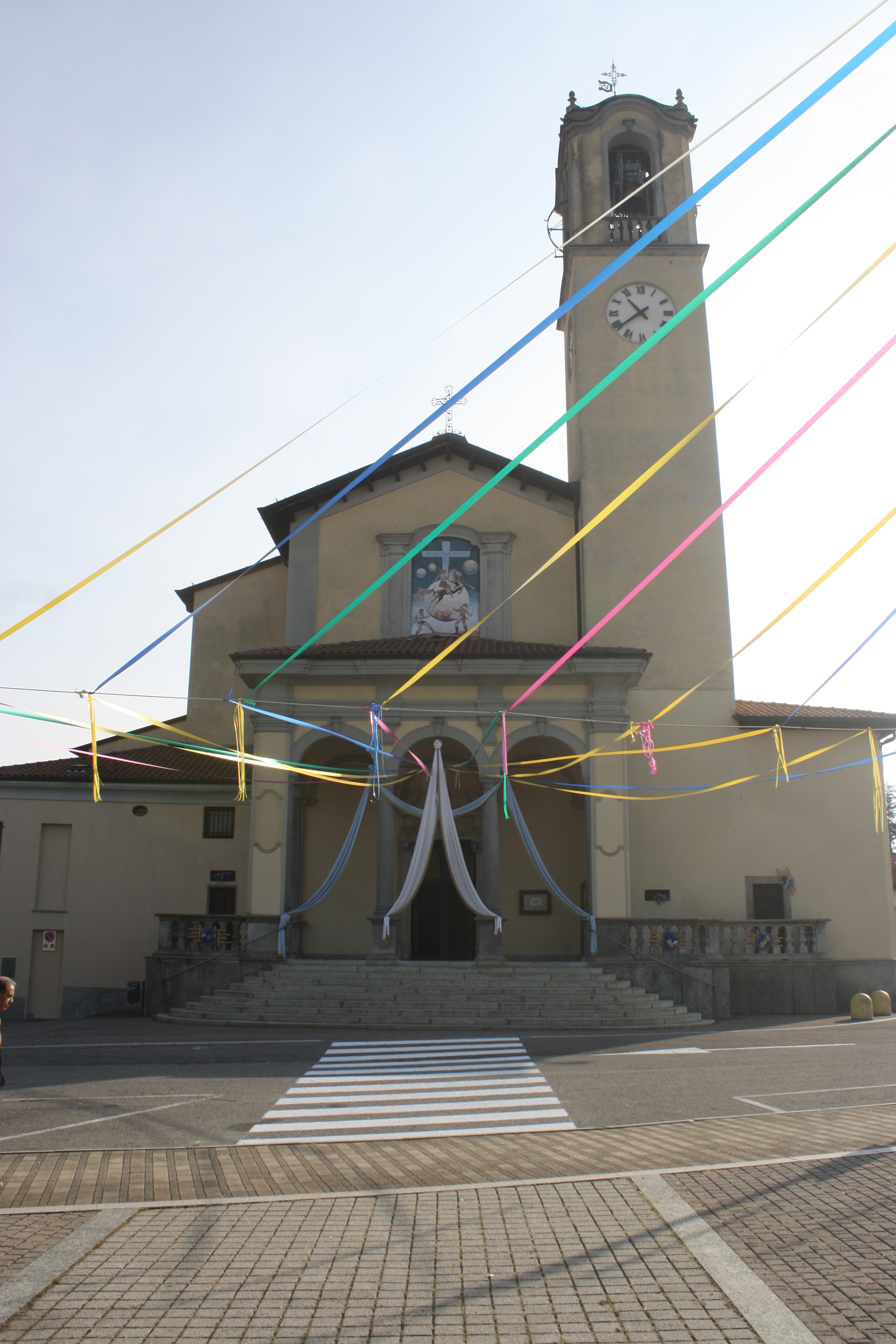 La chiesa di Sant'Alessandro Martire ad Albizzate.